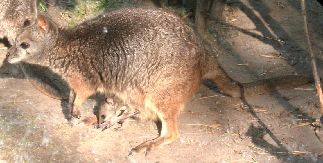 Macropus eugenii in Budapest Zoo